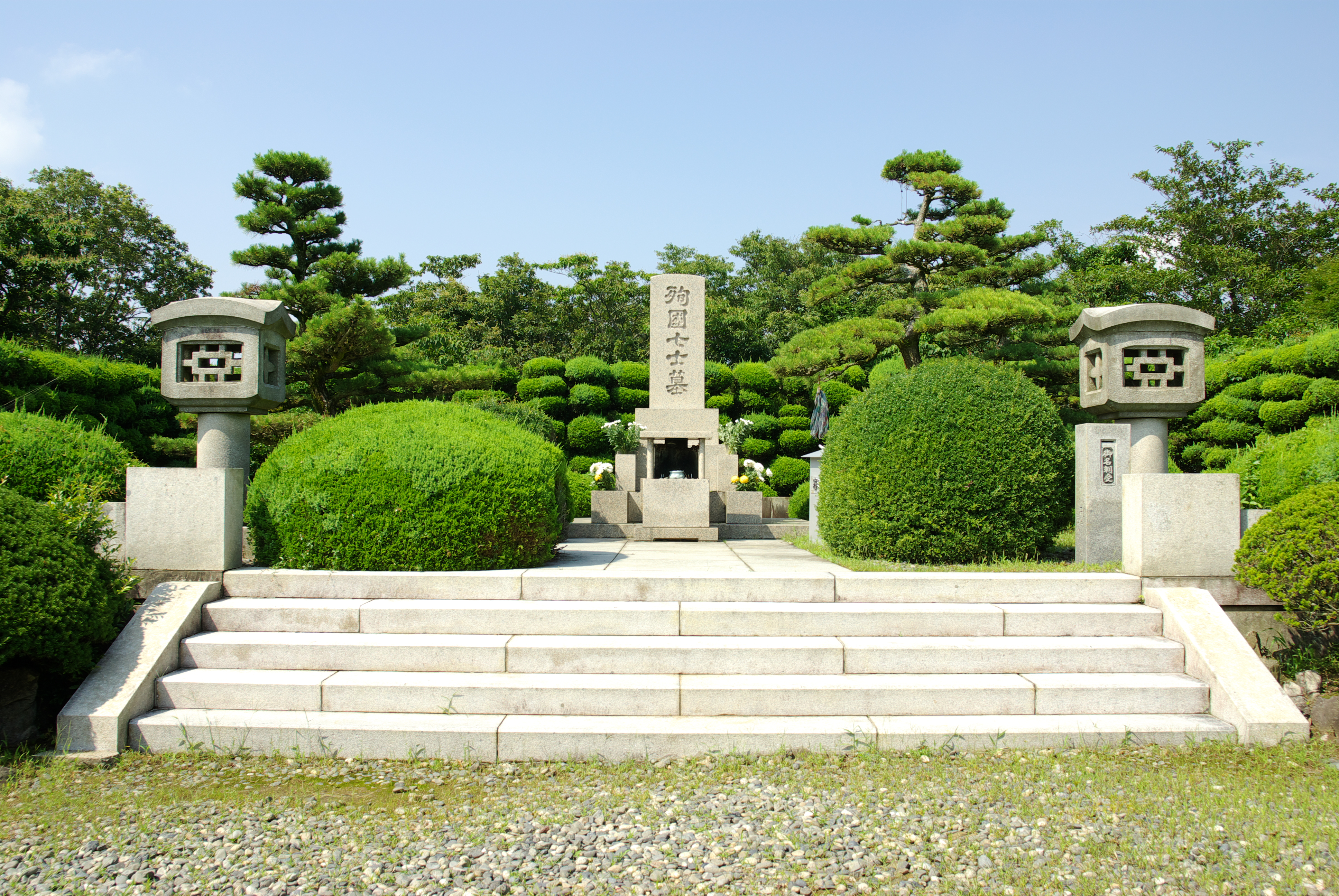 愛知県西尾市三ケ根山殉国七士墓